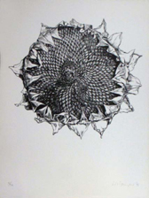 Sonnenblume, 1976, mm 460x350 (Blatt), Lithographie (mit Tuschfeder) – Auflage 30+XX Exemplare, Drucker Bulla, Rom, Bez.u.r.“Carl Timner 76“